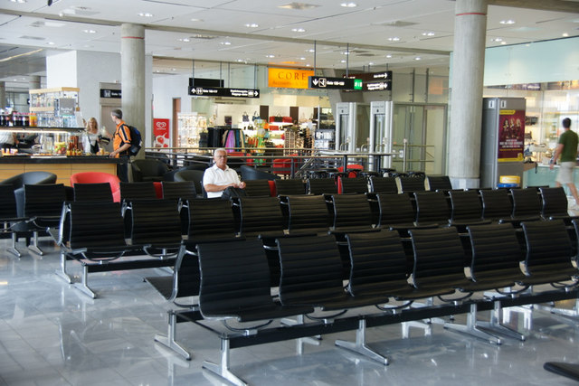 Abflughalle, Flughafen Stuttgart (Departure lounge, Stuttgart Airport)